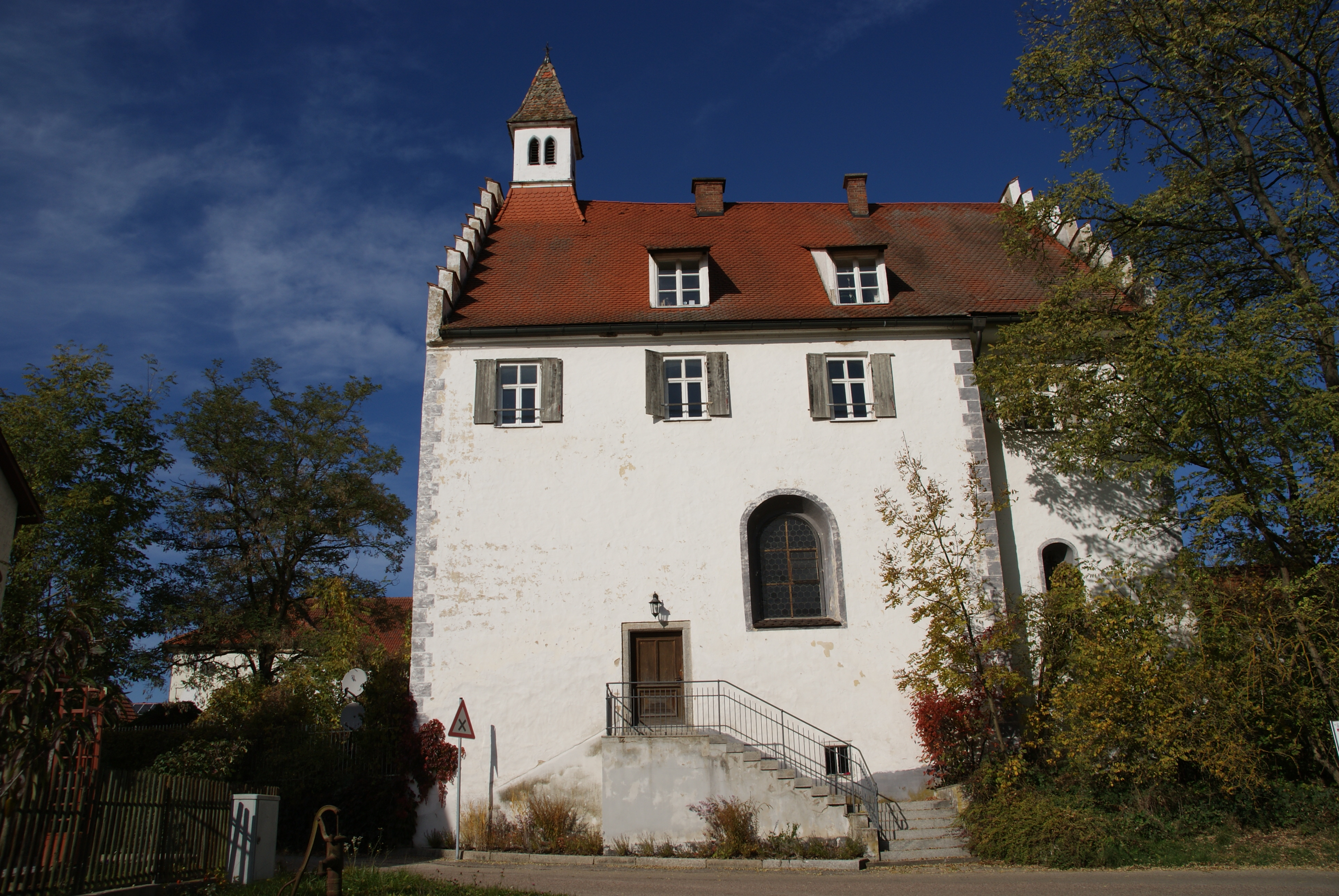 Ehem. Schloss, giebelständiger, gestelzter und dreigeschossiger Satteldachbau mit Treppengiebeln, Dachreiter und Schlosskapelle St. Dionysius, spätmittelalterlich, Umbauten 1697 und 1759; mit Ausstattung; Grundmauerreste eines ehem. Wohnturms, Buckelquader, Granit, 12./13. Jahrhundert.